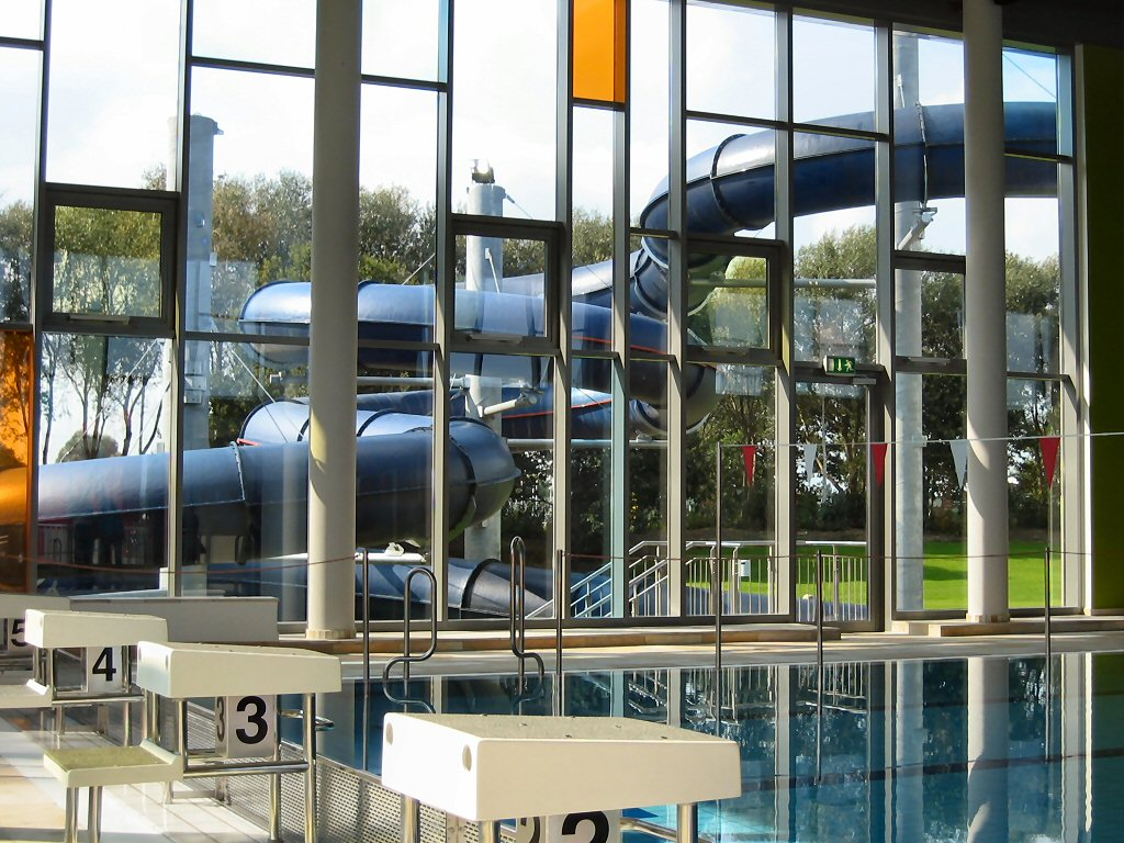 Wilhelmshaven, Blick auf die Rutsche im neuen Hallen- und Freizeitbad "Nautimo"